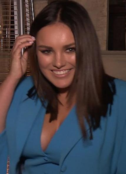 Ewa Farna 2018